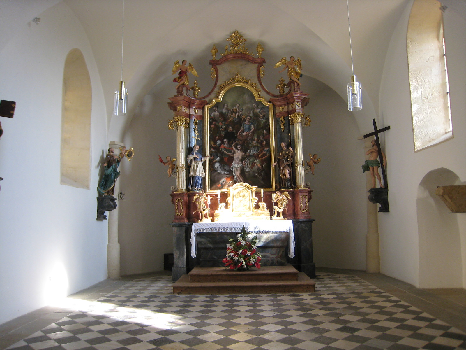 Straden, St. Sebastian - Oberkirche